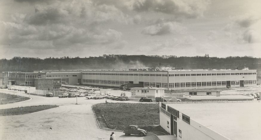 Chemical products plant Harshaw-Poulenc-Coiffe ZI Romanet Limoges (France) ca 1965